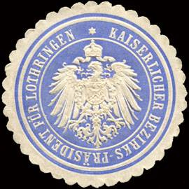 Sealing stamp Title: Kaiserlicher Bezirks - Präsident für Lothringen Description: hellblau, weiß, geprägt Place: size: 4 cm